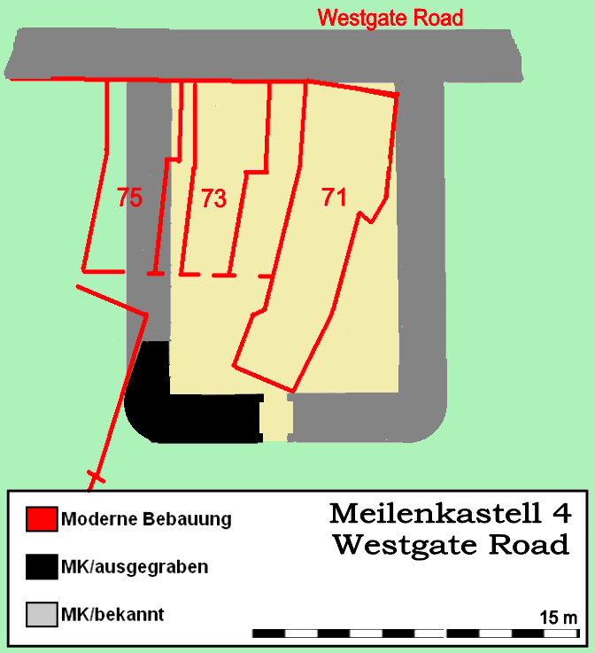 Befundskizze des Meilenkastell 4 Westgate Road am Hadrianswall, Newcastle/England.